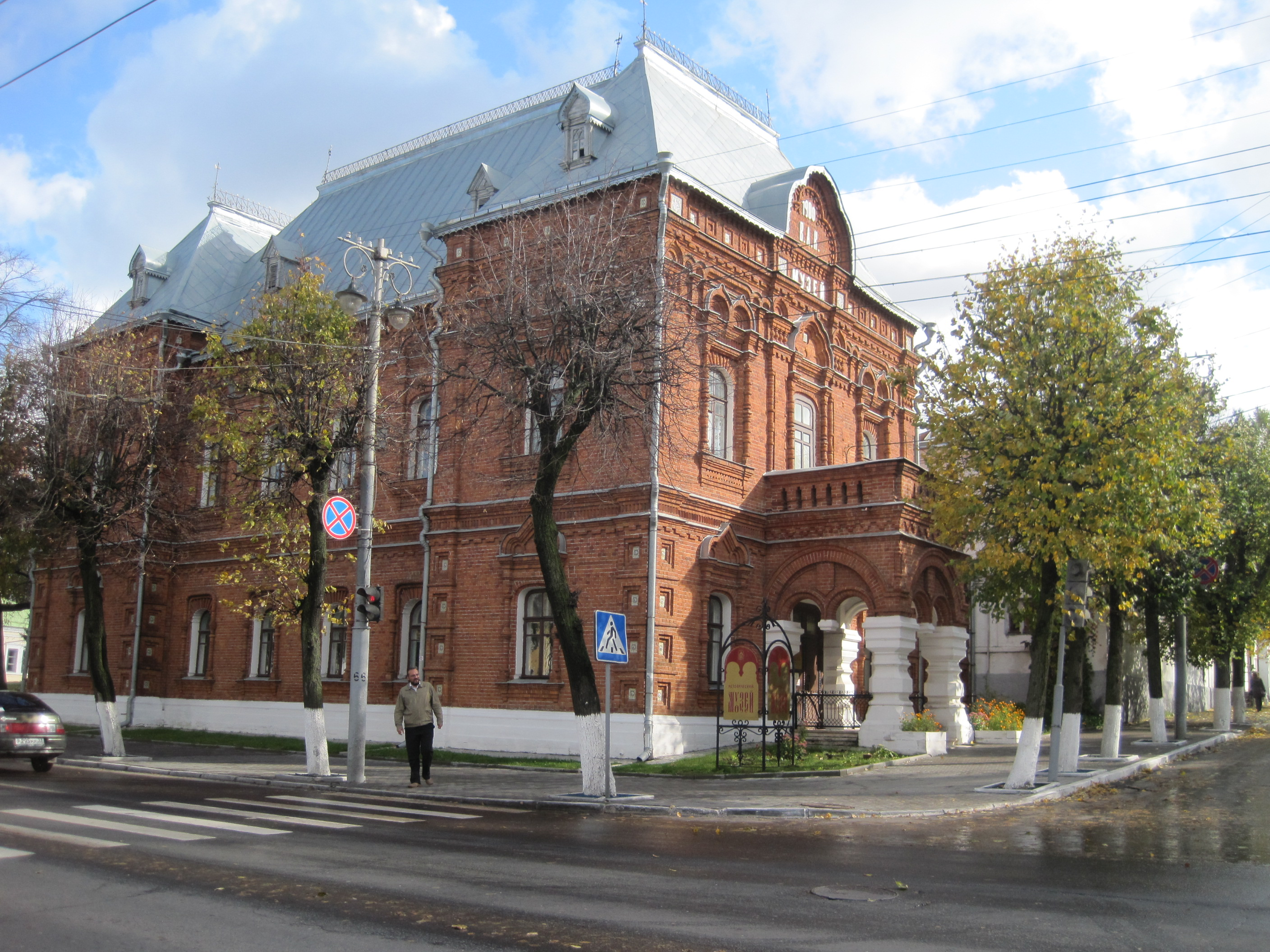 Musée d' histoire à Vladimir